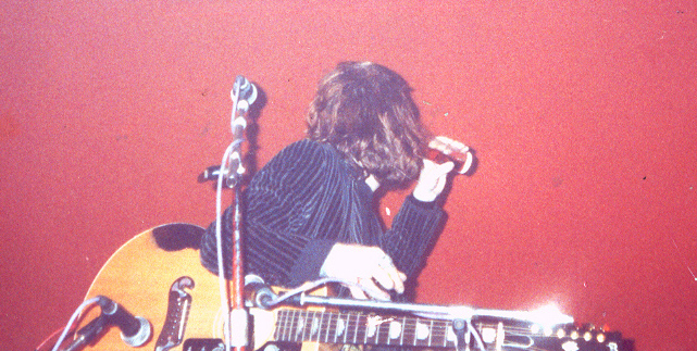 Tyla drinking